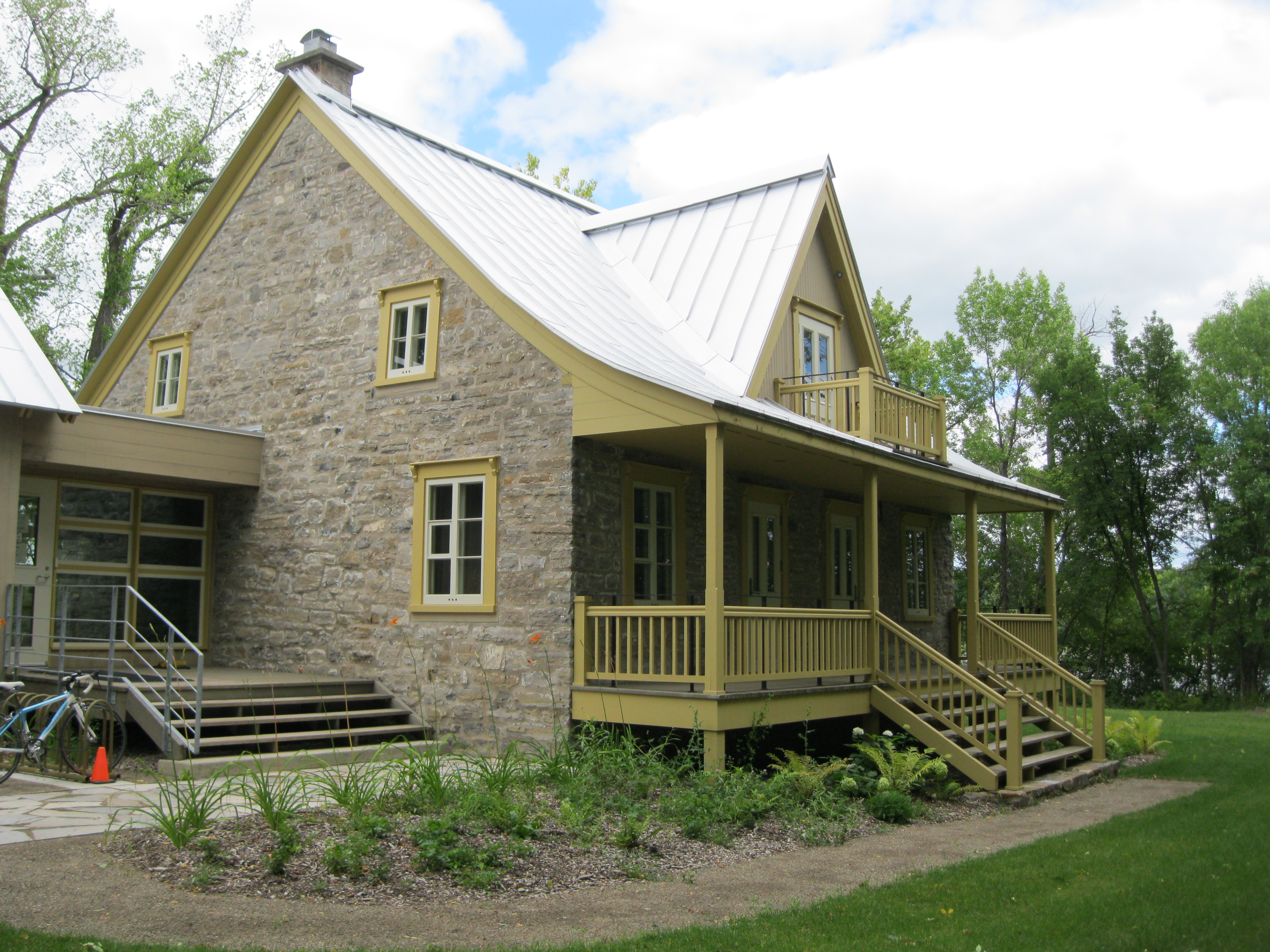 Maison Jacques-Richer dit Louveteau, 163, chemin du Cap-Saint-Jacques